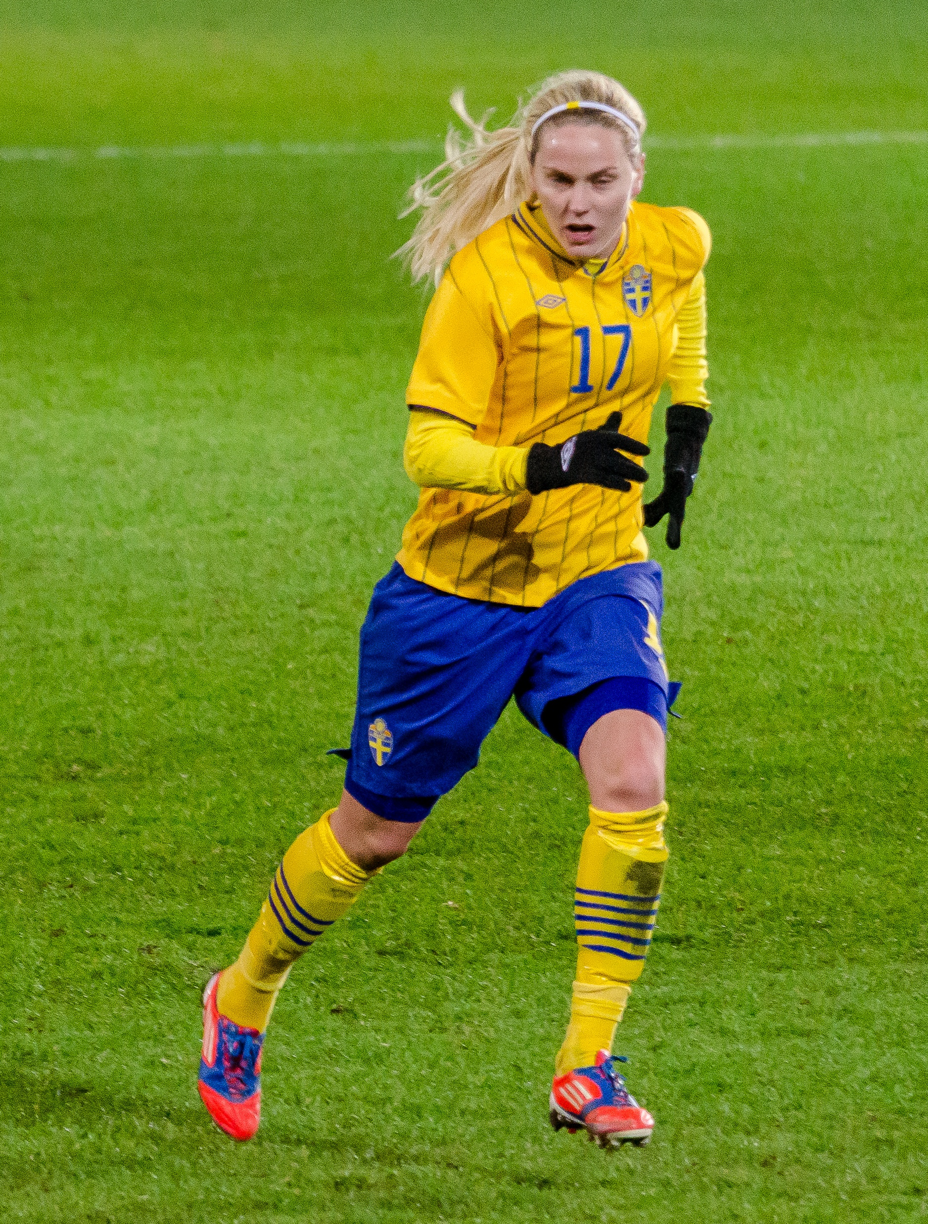 Lisa Dahlkvist i den första landskampen på Myresjöhus Arena (tillika Pia Sundhages debut som svensk förbundskapten) 23 oktober 2012, där Sverige slog Schweiz med 3-0 inför 4905 åskådare.